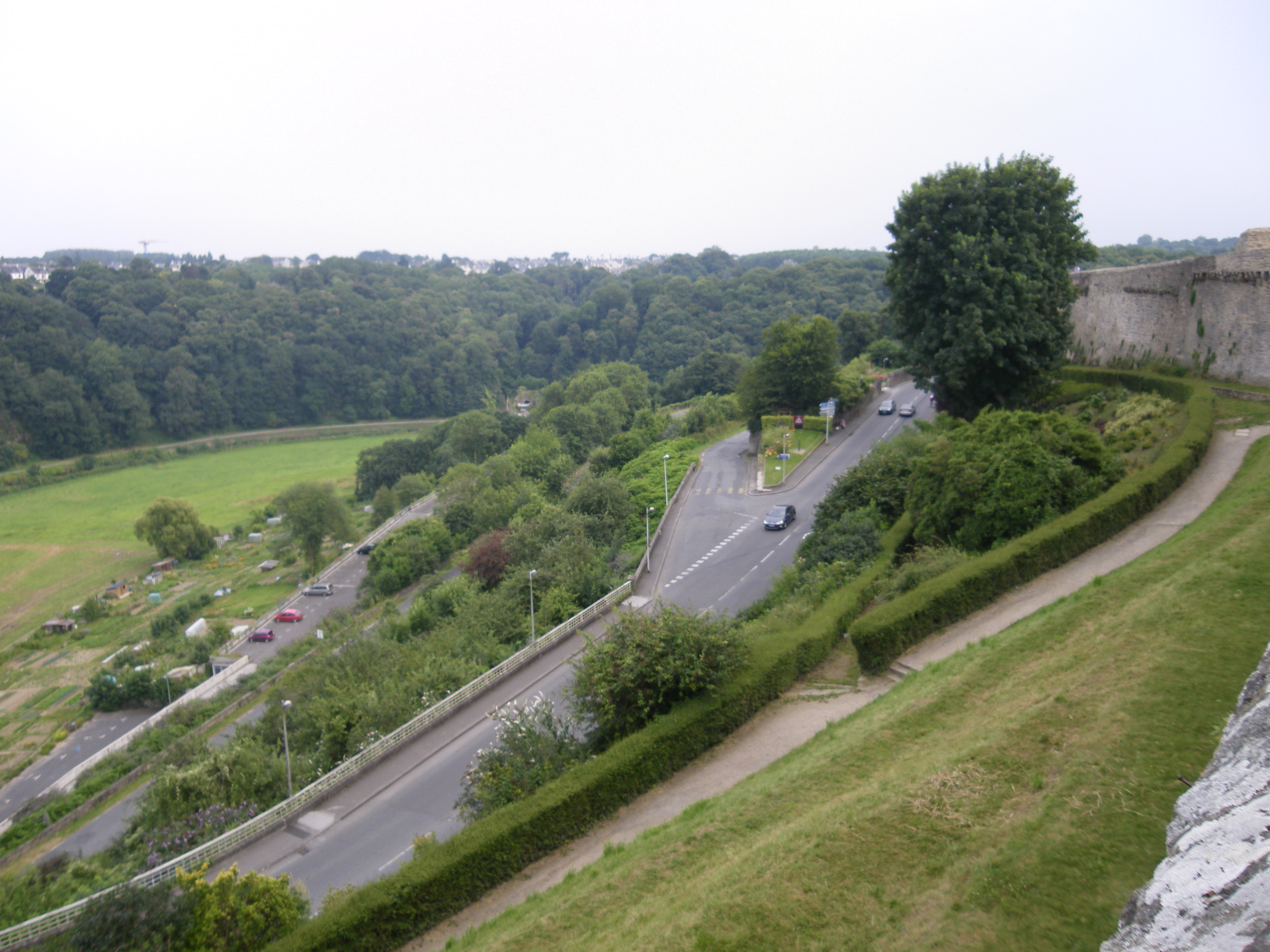 vue de dinan depuis les remparts